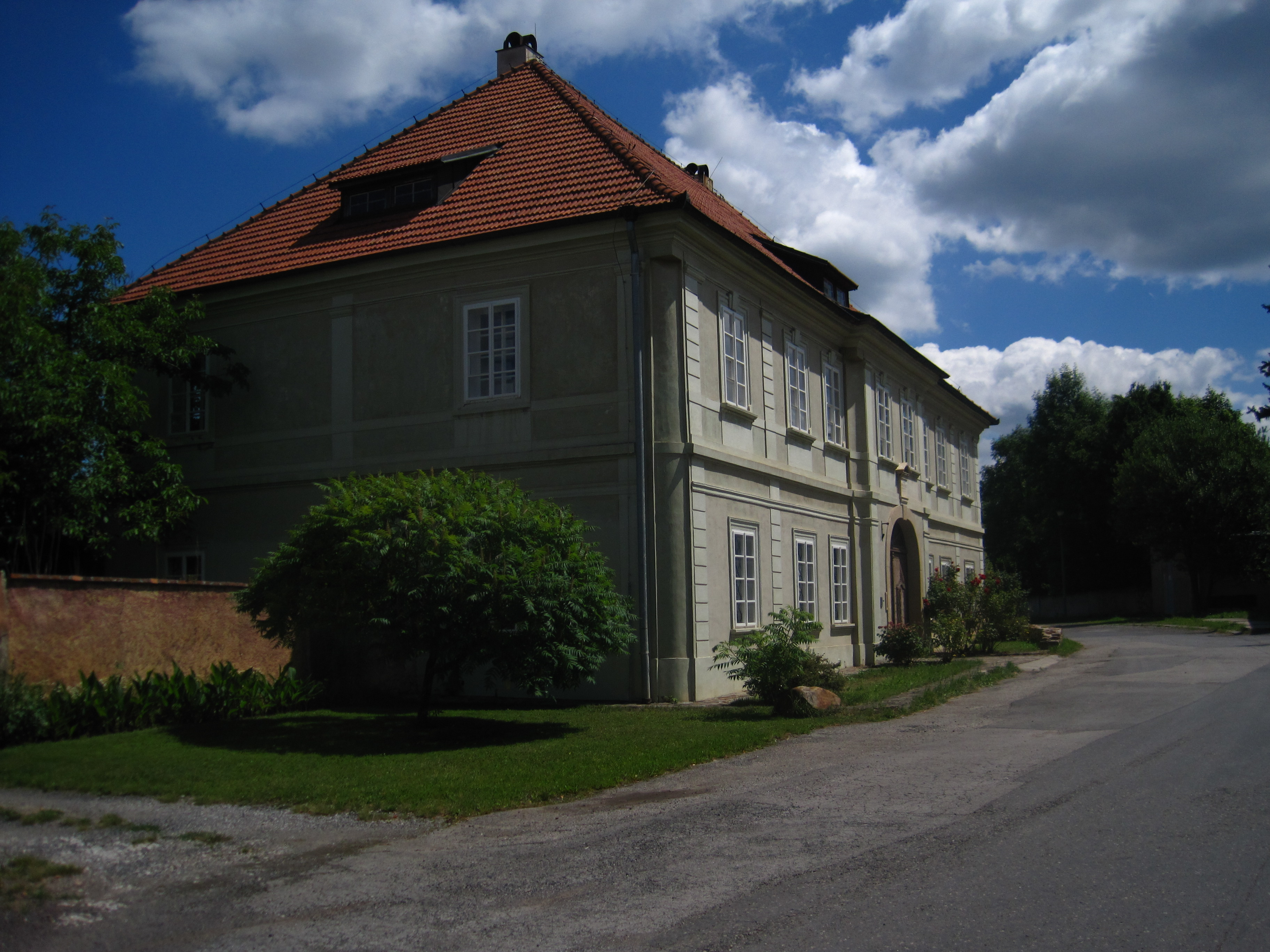 Dům čp. 71, Tyršovo náměstí 71, Hostomice (okres Beroun).